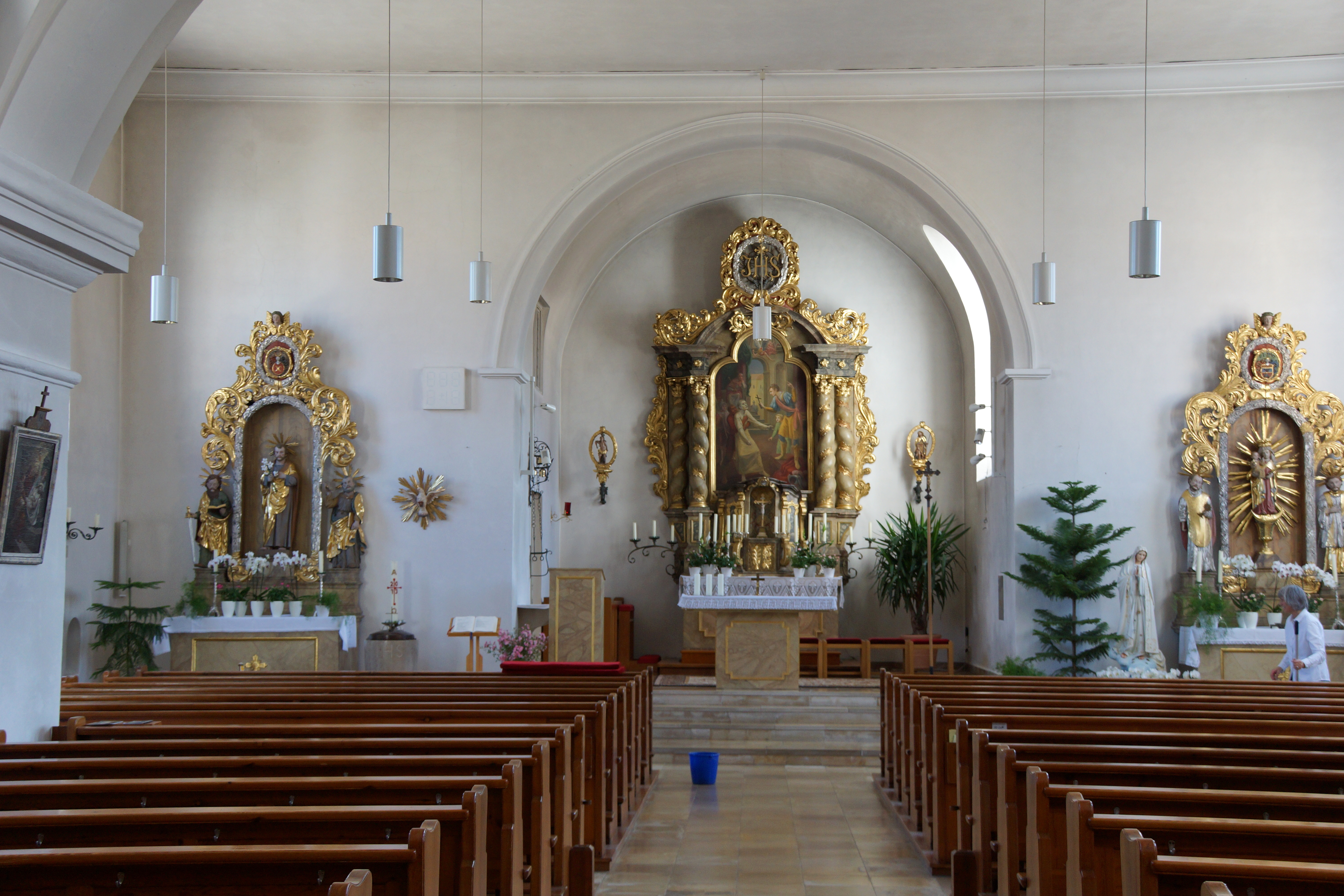 Die katholische Pfarrkirche St. Vitus in Ursensollen, Oberpfalz